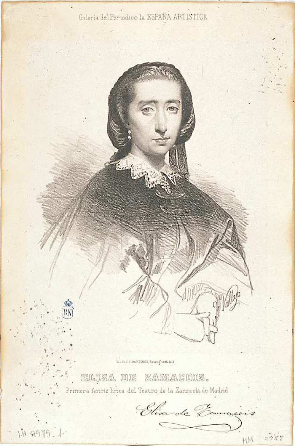 Retrato Elisa de Zamacois. Primera actriz lírica del Teatro de la Zarzuela de Madrid. Litografía de José Vallejo para La España Artística. Biblioteca Nacional de España